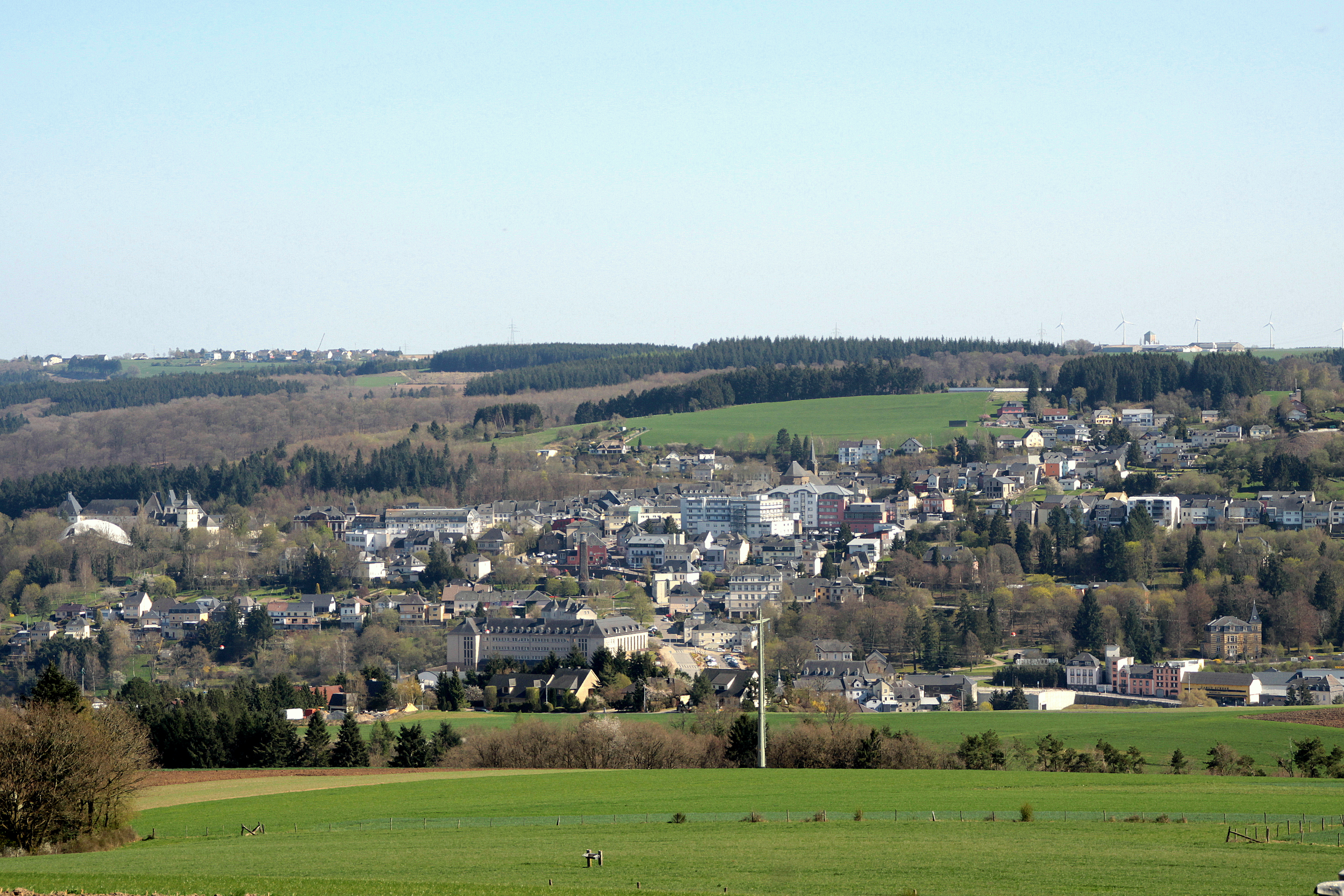 Wolz vun Näertreng aus gesinn